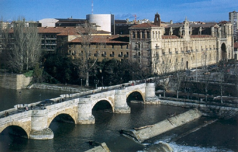 date du cliché octobre 2000